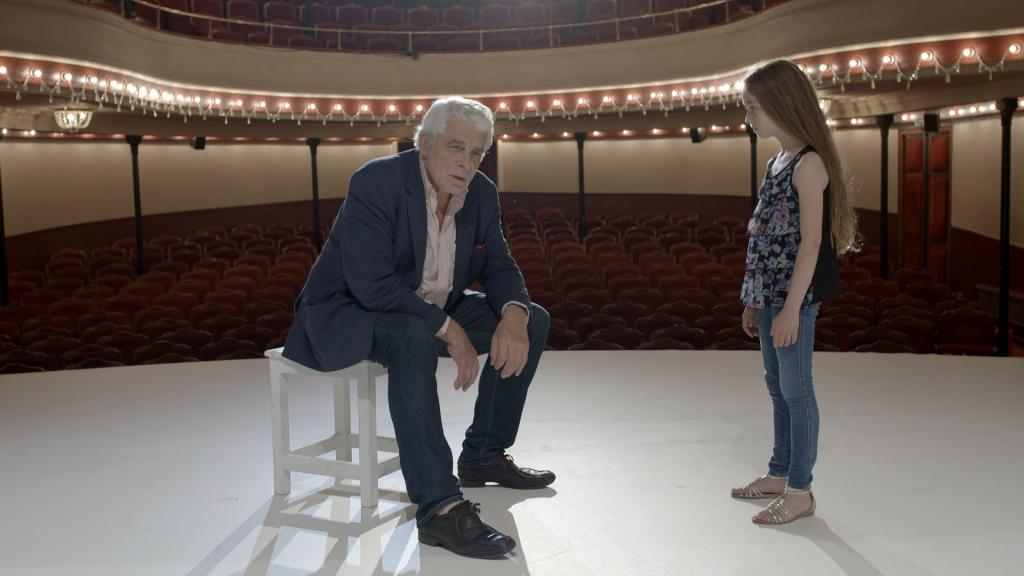 Jacques Weber et Nastasjia Sojcher jouent sur une scène de théâtre